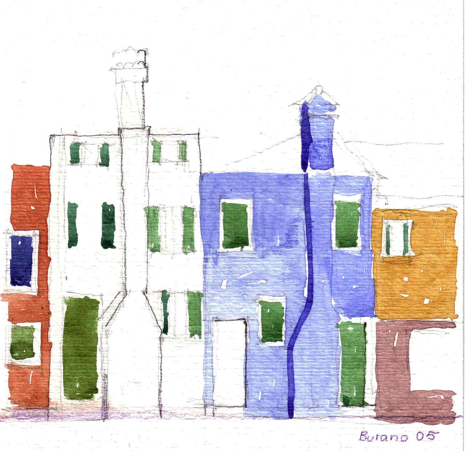 akvarell-skisse av den dansk/norske arkitekten Birgit Cold